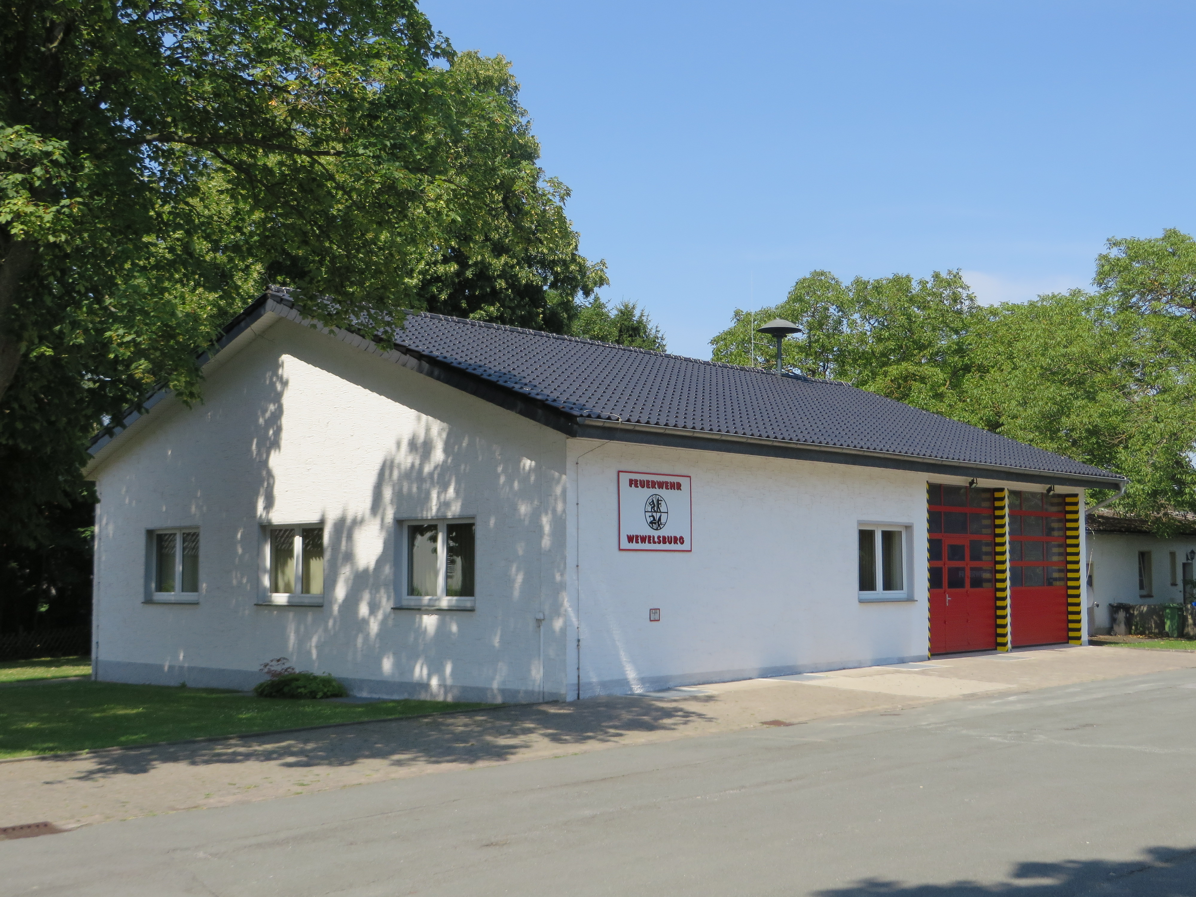 Wache der Feuerwehr Wewelsburg, ehemalige Lagerküche des KZ Niederhagen